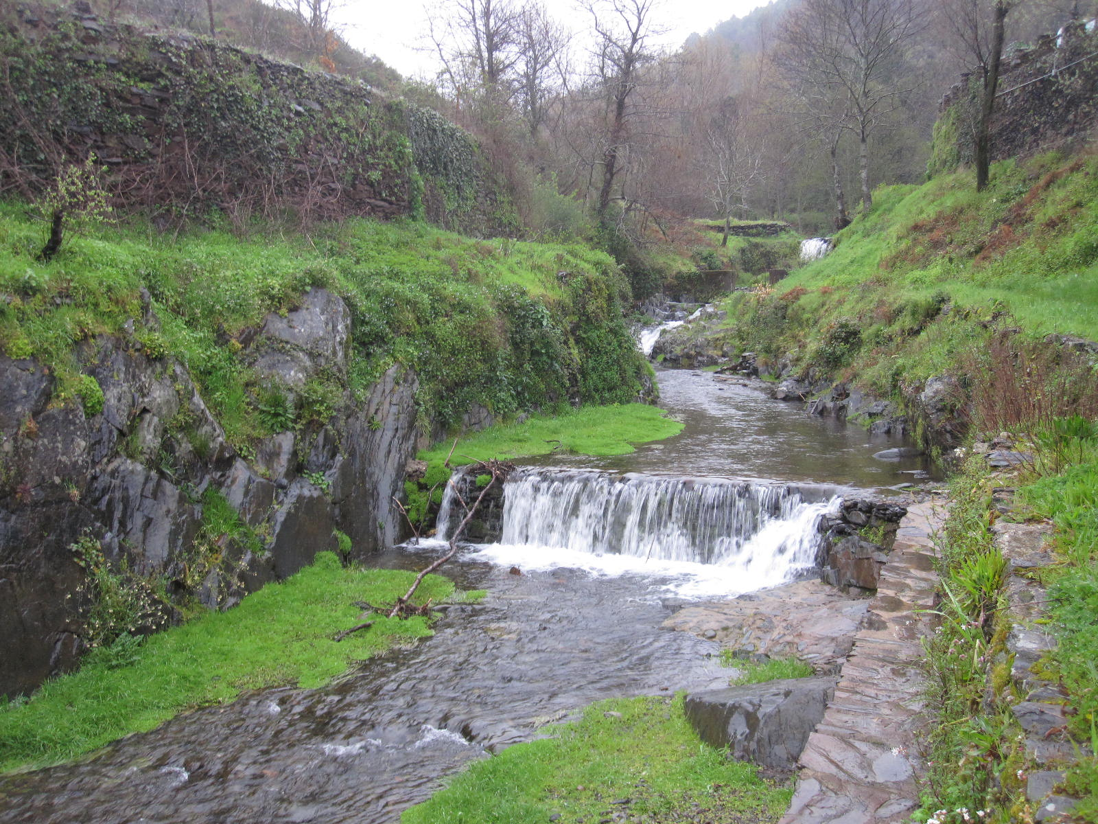 Sierra de Gata This is a photography of a Special Area of Conservation in Spain with the ID: ES4320037. Natura2000 entry, EEA entry